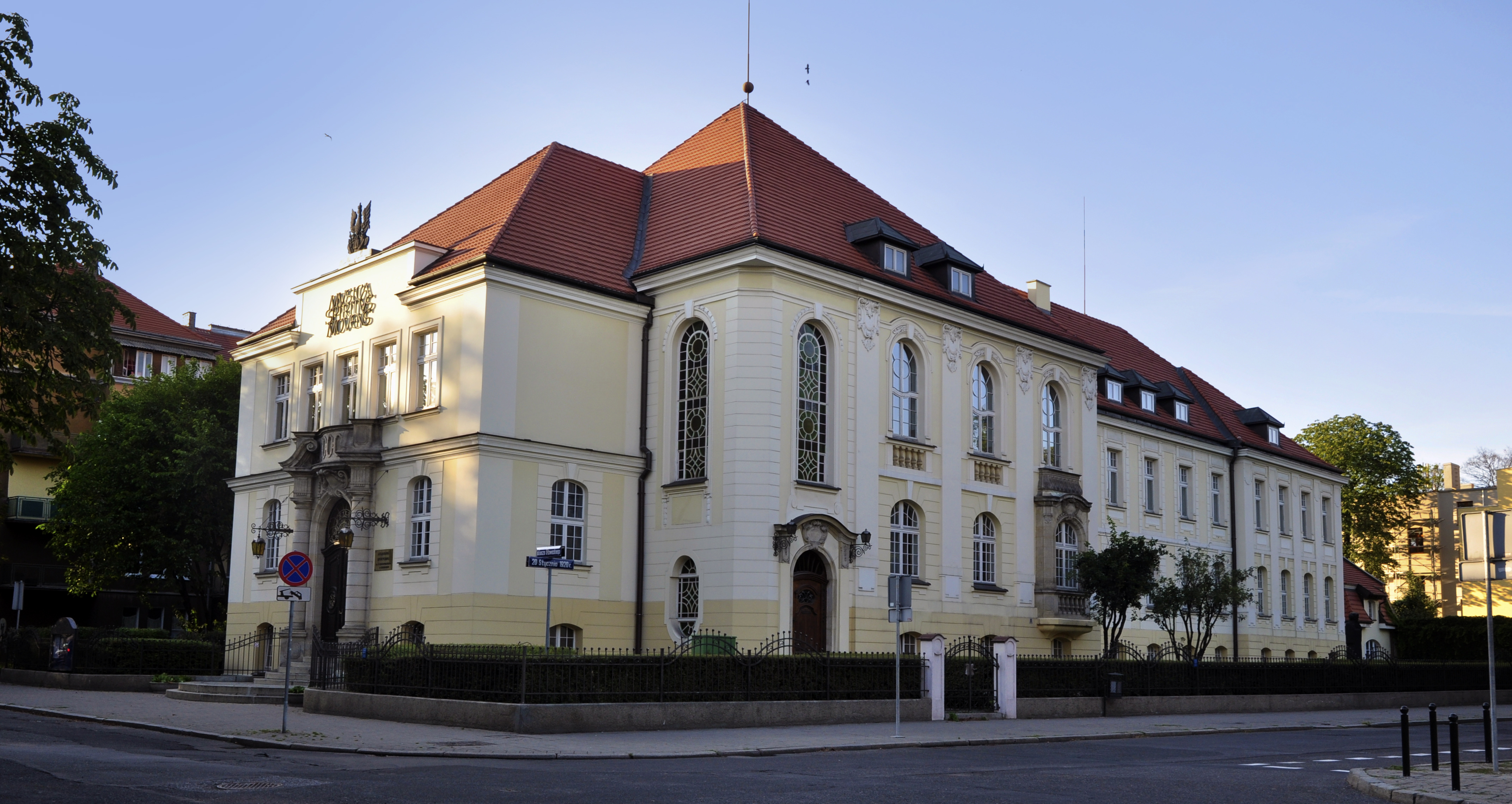 zespół Urzędu Powiatowego, 1904-06: gmach Urzędu Powiatowego (Landratury), ob. Akademia Muzyczna wozownia stajnia